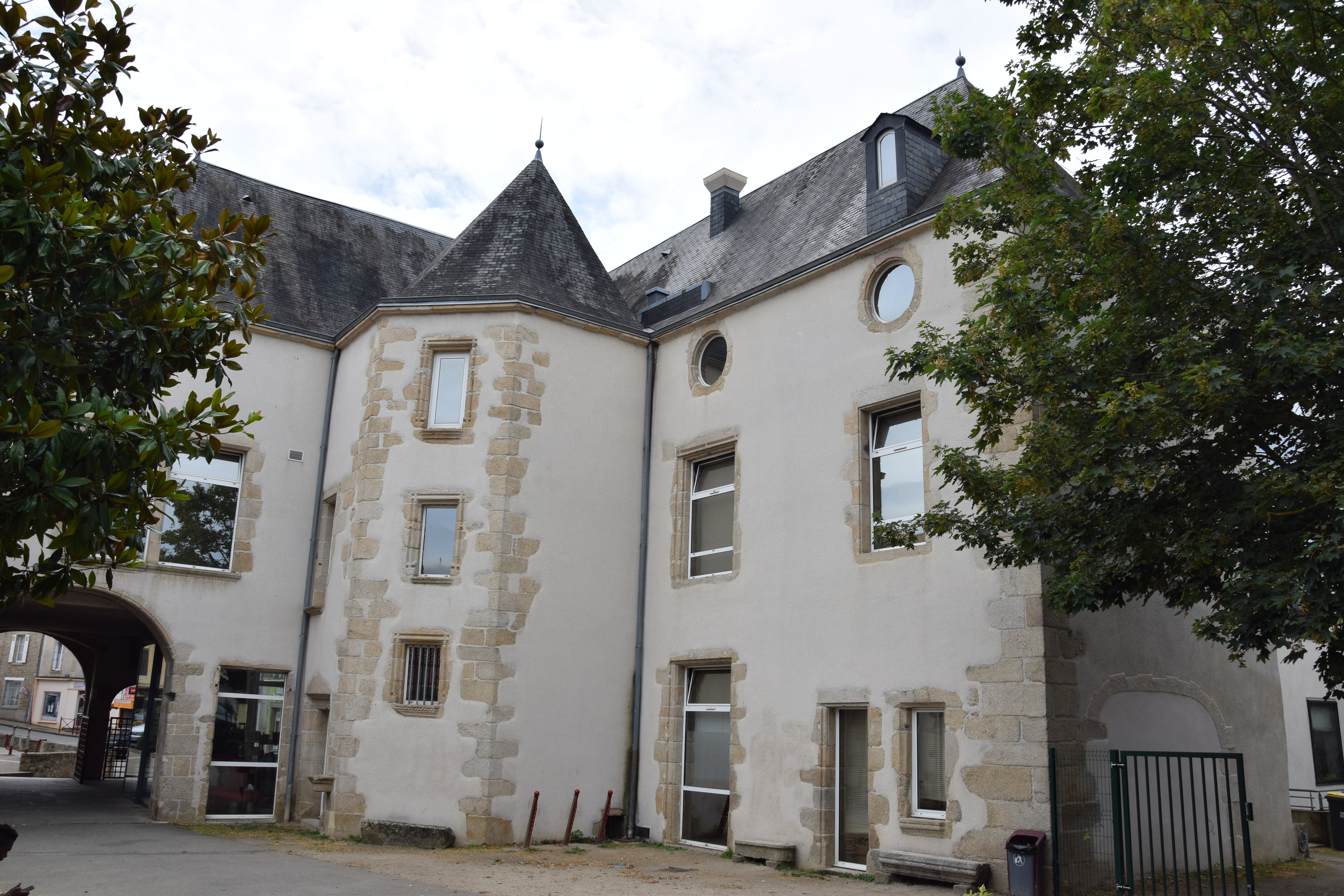 Bressuire